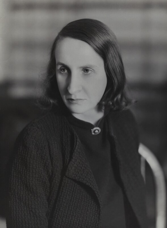 Elisabeth Lutyens, February 1939